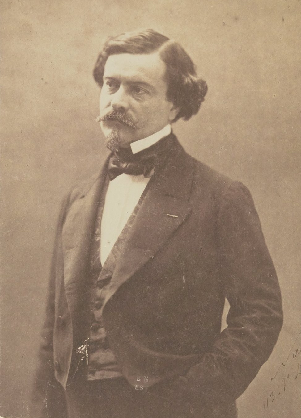 Francis Wey par Nadar